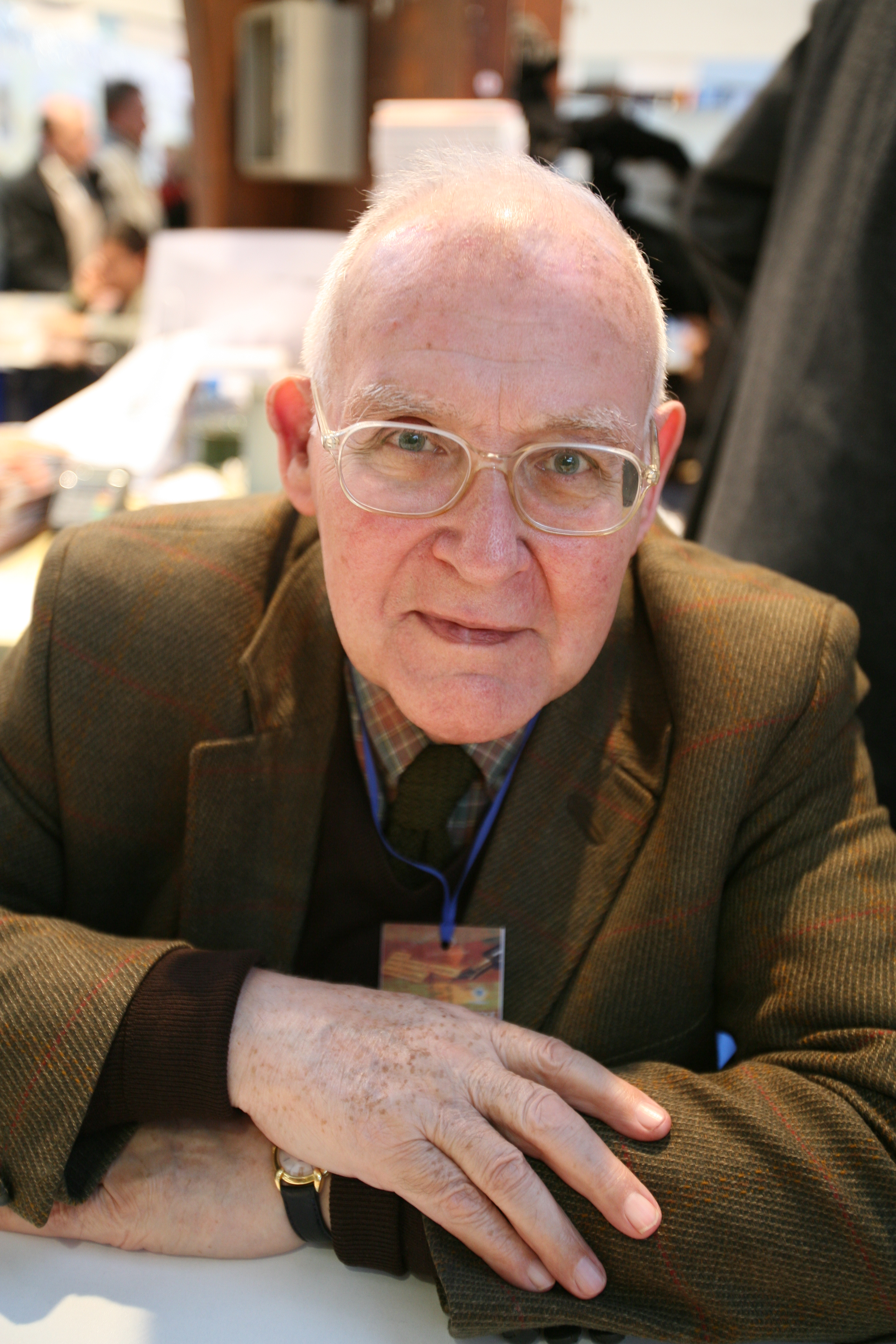 Portrait de Robert Sabatier, poète et écrivain français